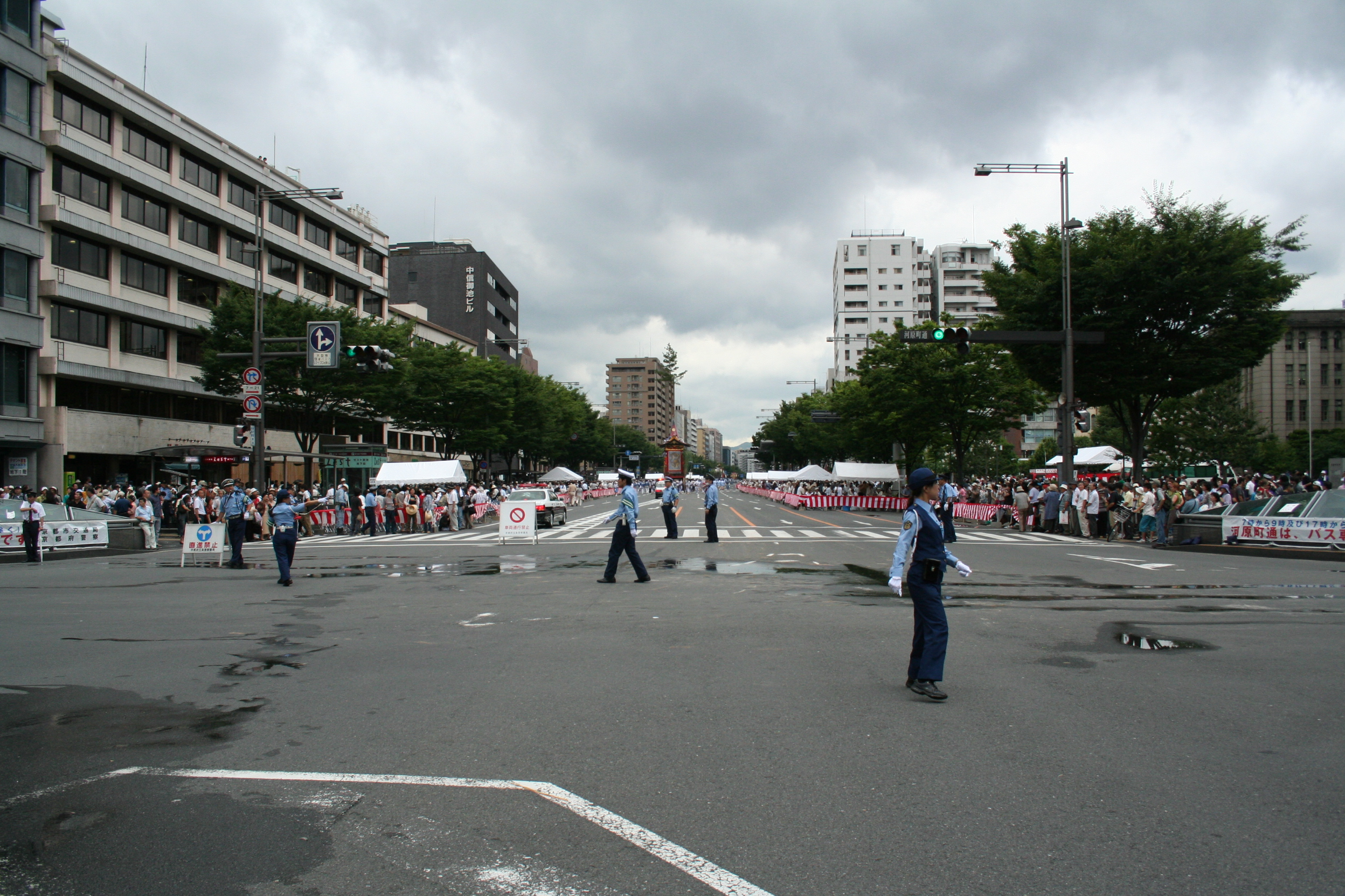 2009年7月17日に京都市で行なわれた祇園祭山鉾巡行の様子。 河原町御池交差点から西側を撮影。